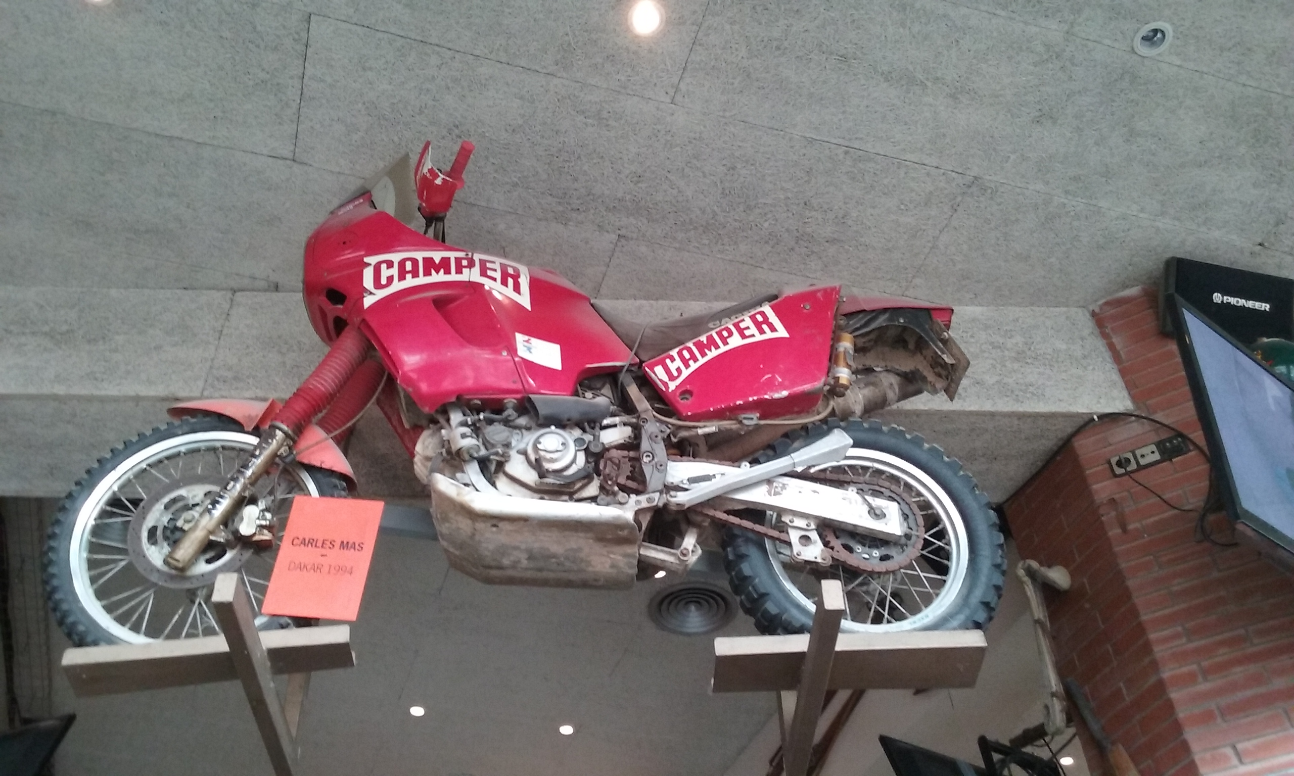 Cagiva de Carles Mas al Rally París-Dakar 1994